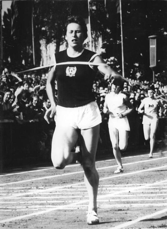 Bärbel Mayer Zentralbild Wlocka-Wittig Wen-L Deutsche Leichtathletik-Meisterschaften vom 18. - 20.7.1958 in Jena UBz: Über 400 m siegte Bärbel Mayer und konnte somit Deutscher Meister werden.